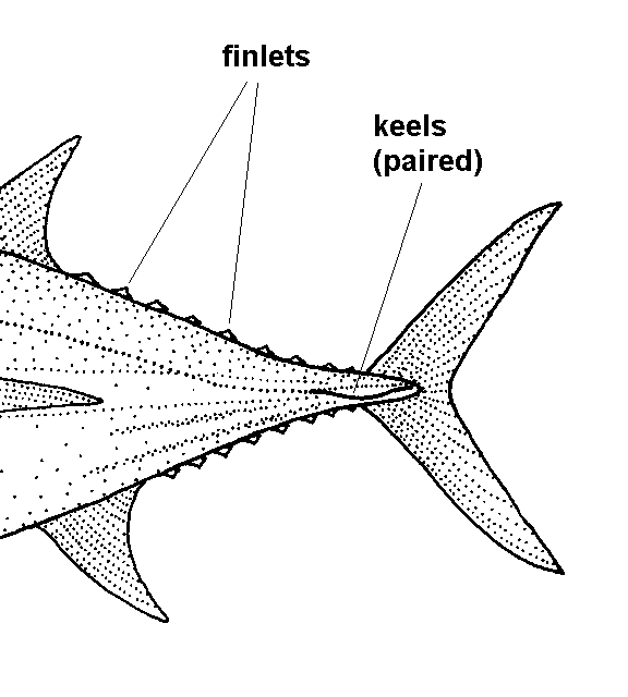 Thunnus obesus (Bigeye tuna) cropped diagram